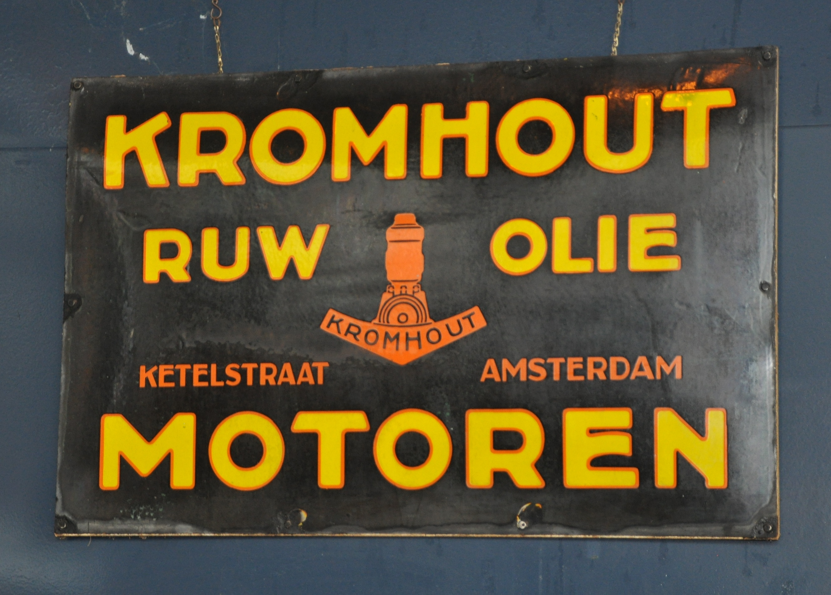 Kromhout diesel engine in the Kromhout museum Amsterdam